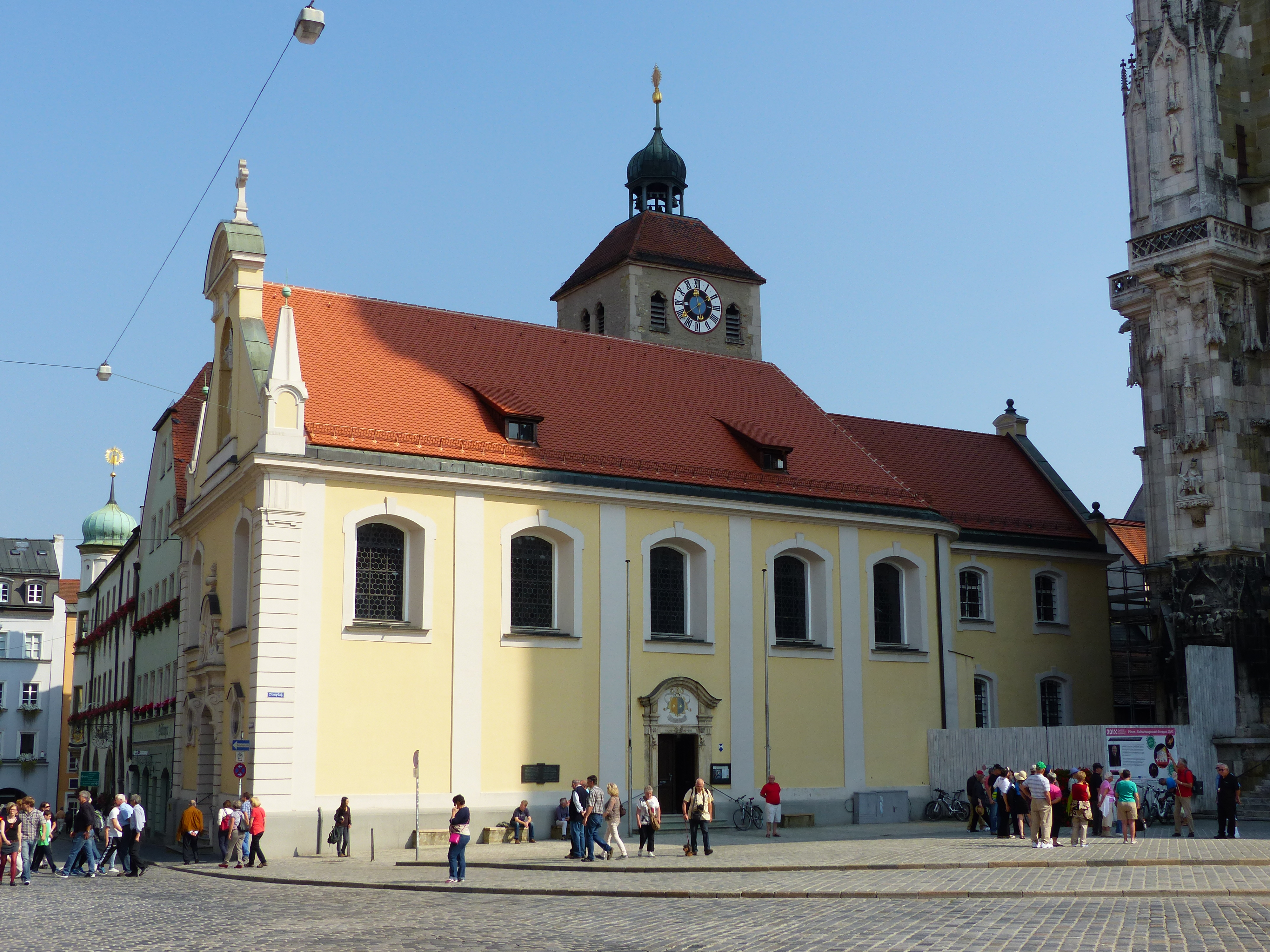 Stiftskirche St. Johann (Regensburg)This is a photograph of an architectural monument.